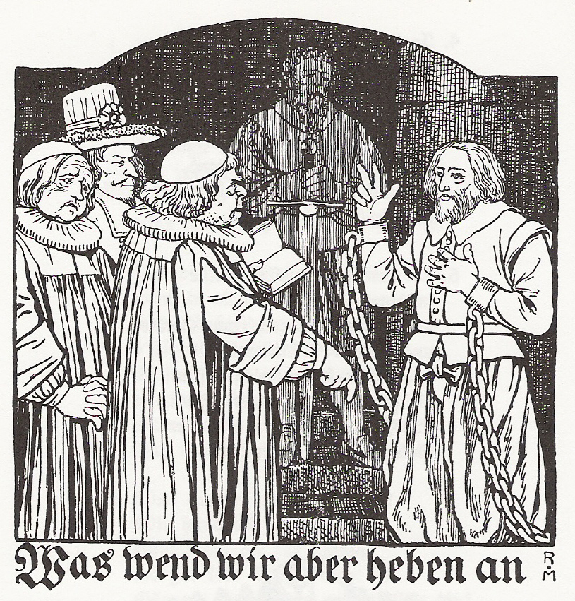 Illustration zum Haslibacher-Lied von Rudolf Münger in der Liedersammlung Im Röseligarte von Otto von Greyerz, 3. Bändchen, Seite 28